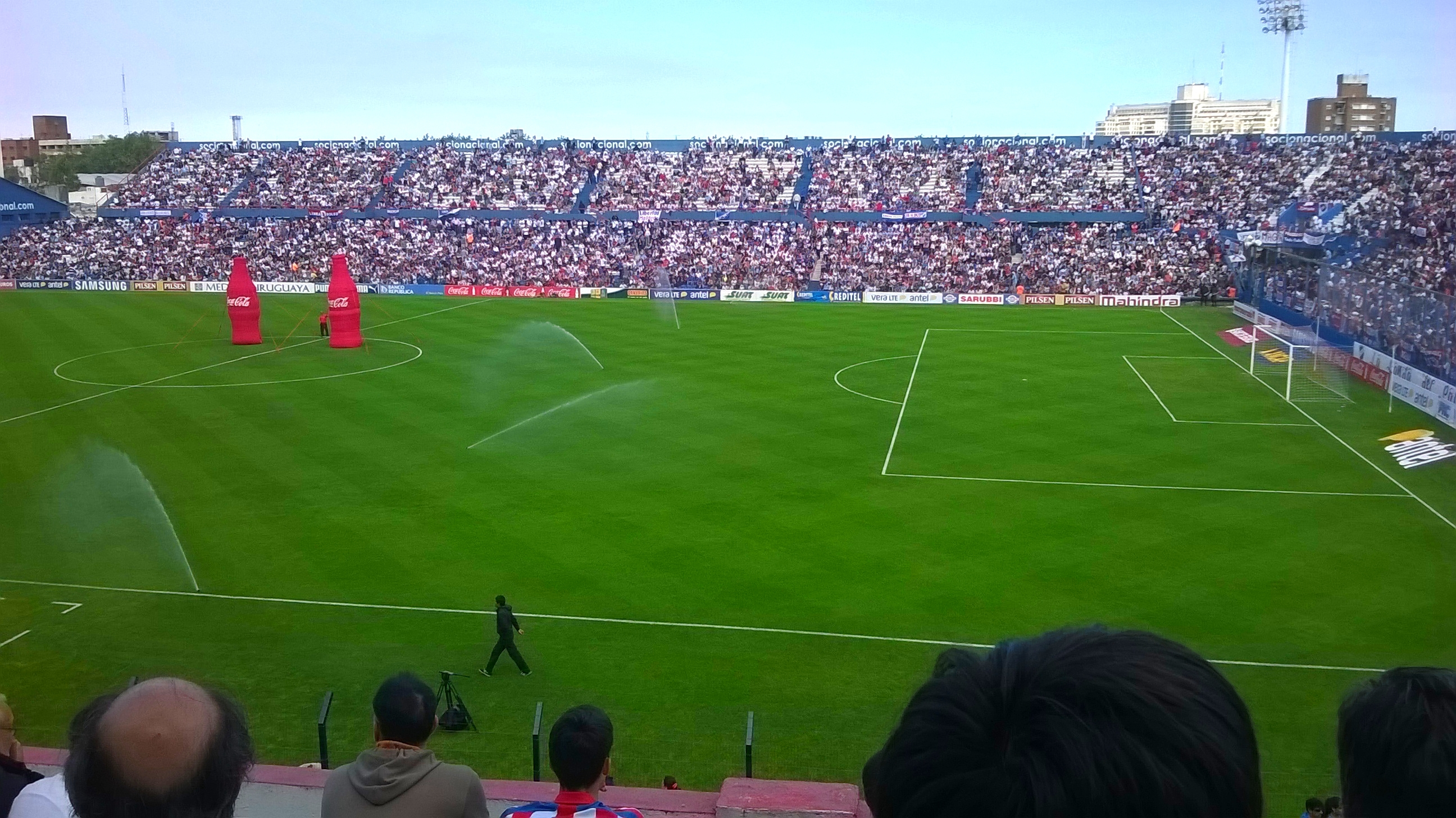 Imagen de las tribunas del estadio Gran Parque Central